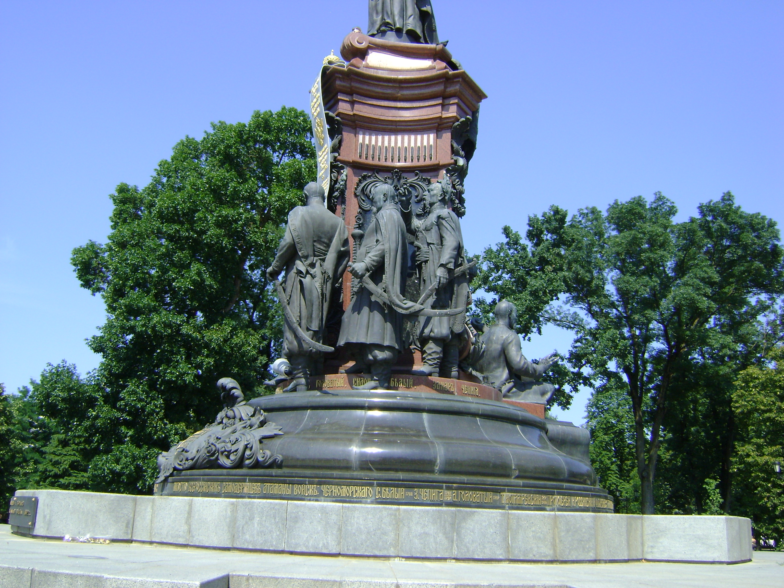 Пам'ятник Катерині ІІ. Краснодар.